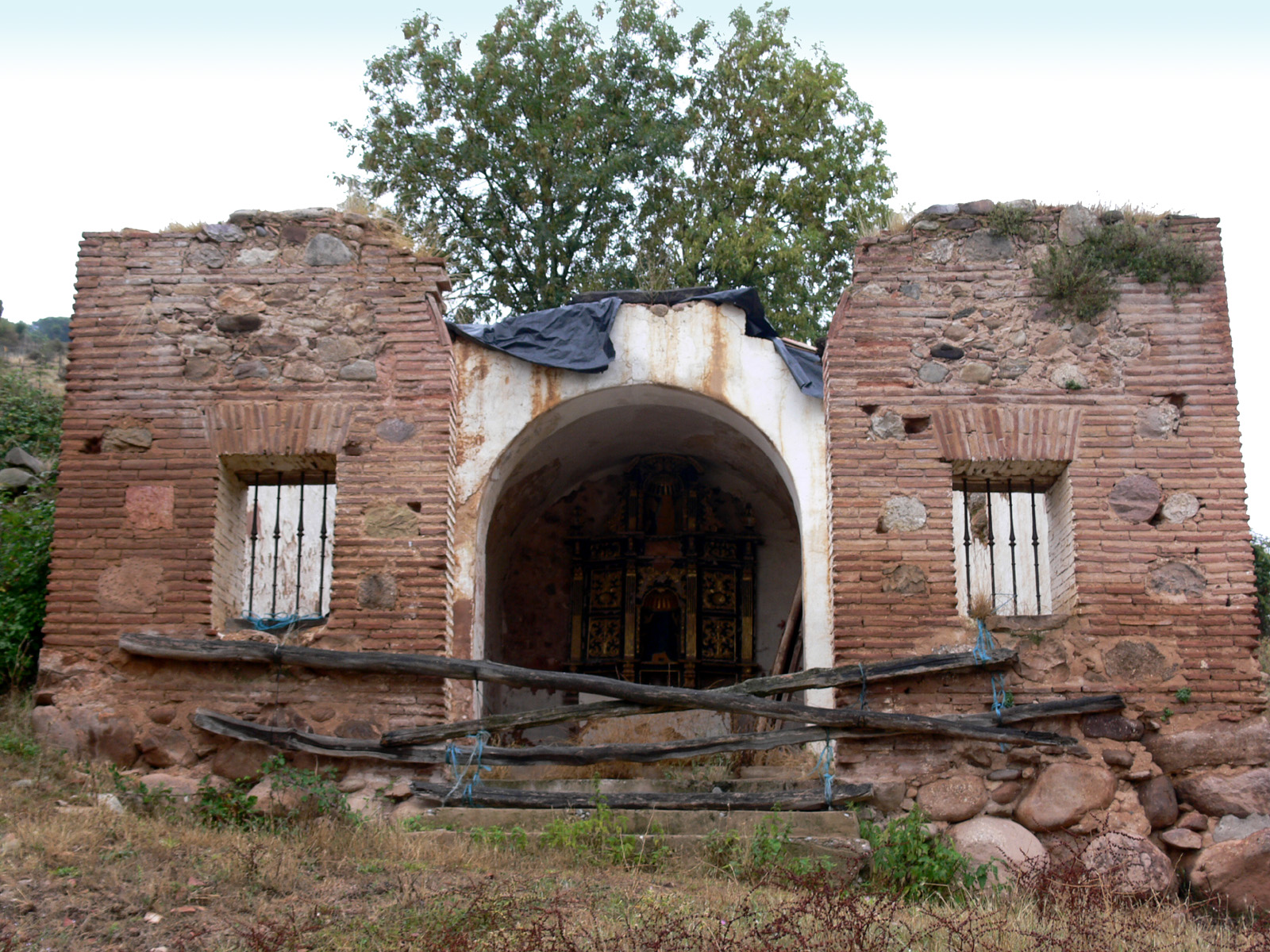 Ruinas de la ermita de Santa Marina en Pedroso (La Rioja - España)